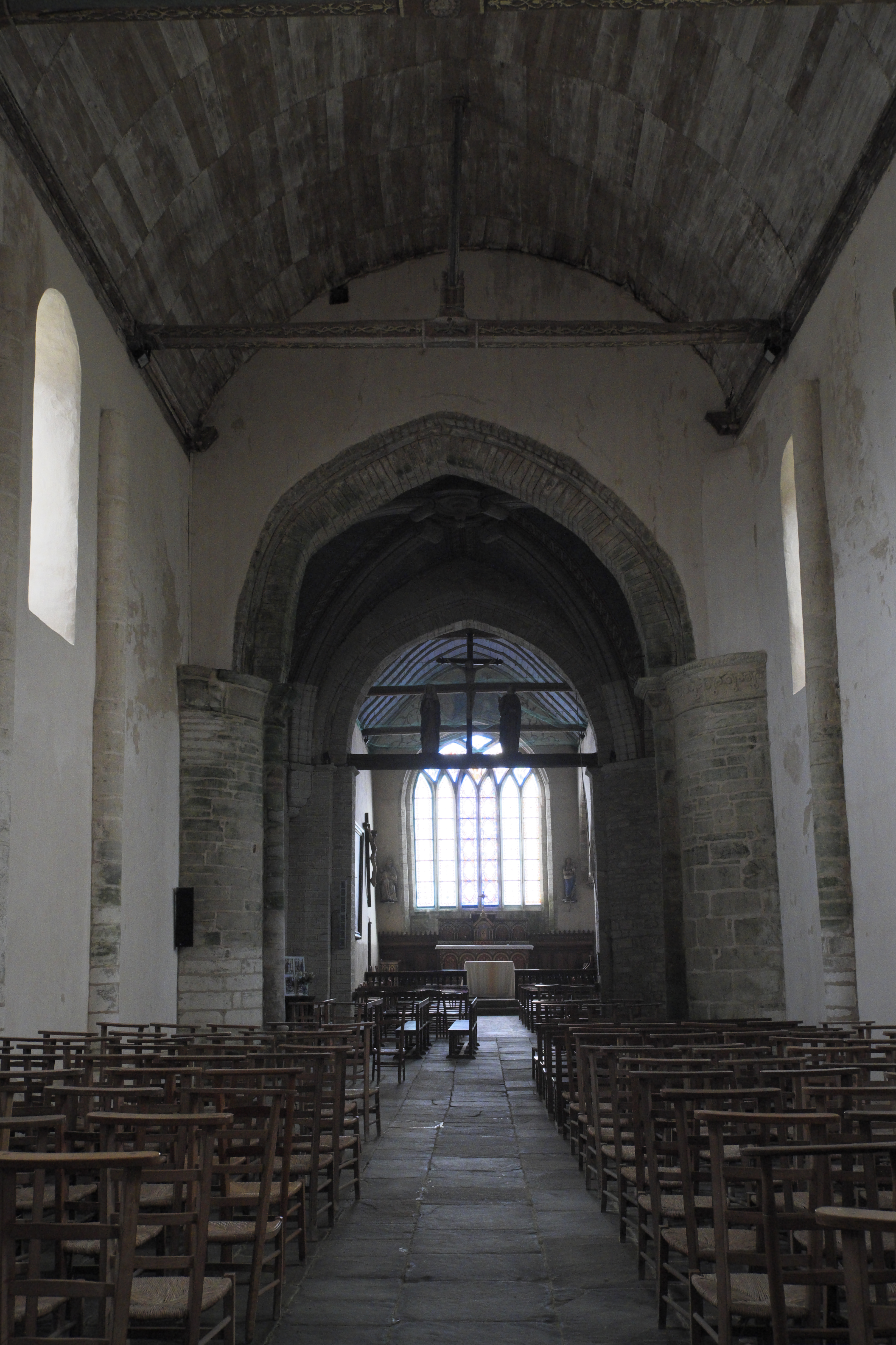 Kapelle Notre-Dame-de-Kernitron in Lanmeur im Département Finistère (Region Bretagne/Frankreich), Innenraum